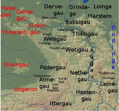 Karte mit der ungefähren Lage der historischen Gaue in und um Ostwestfalen-Lippe